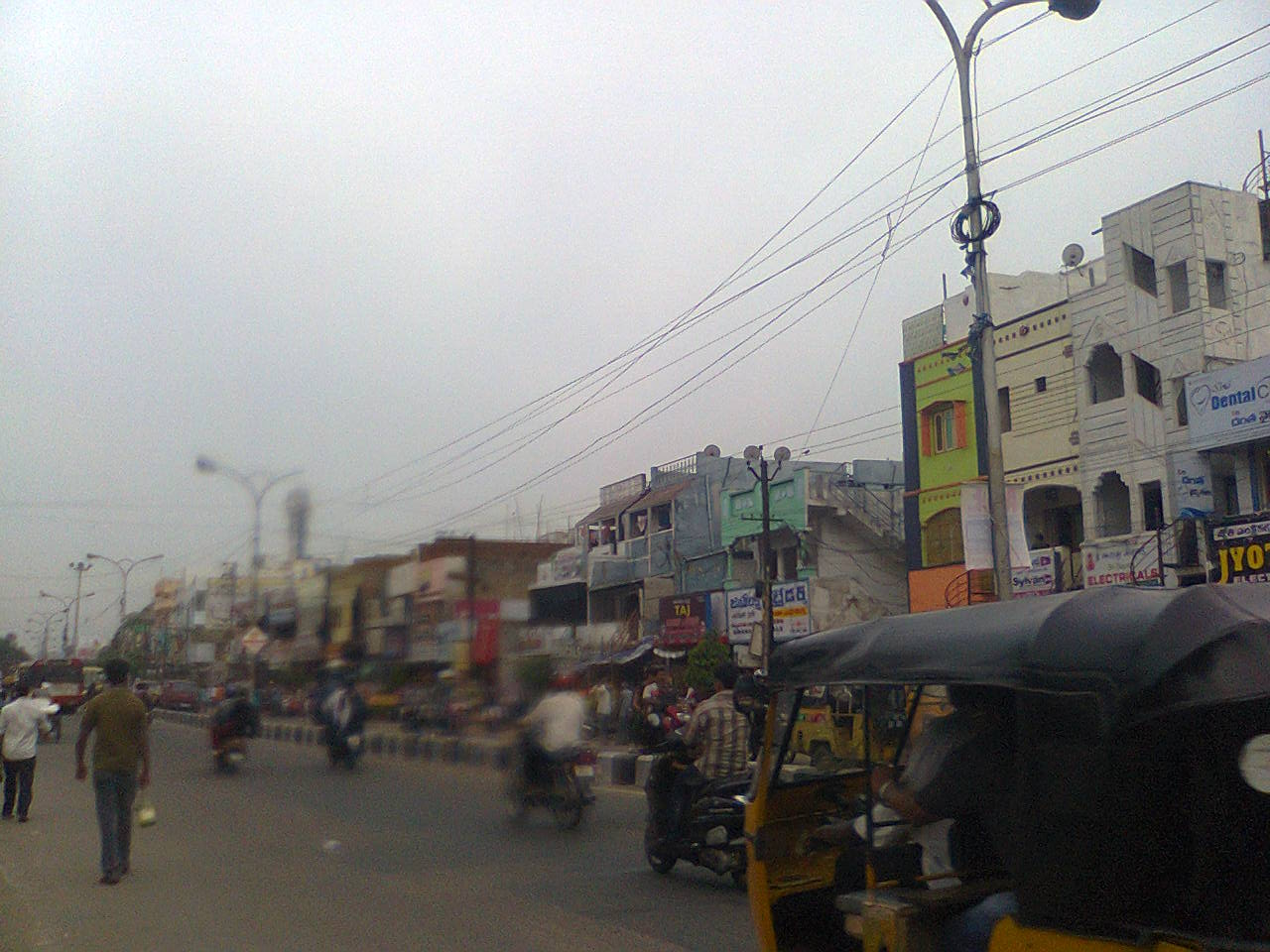 శ్రీహరిపురం రహధారి